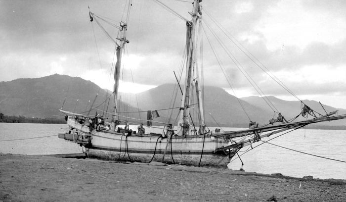 Negatief. Een Boeginese prauw aan de kust van Zuid-Celebes